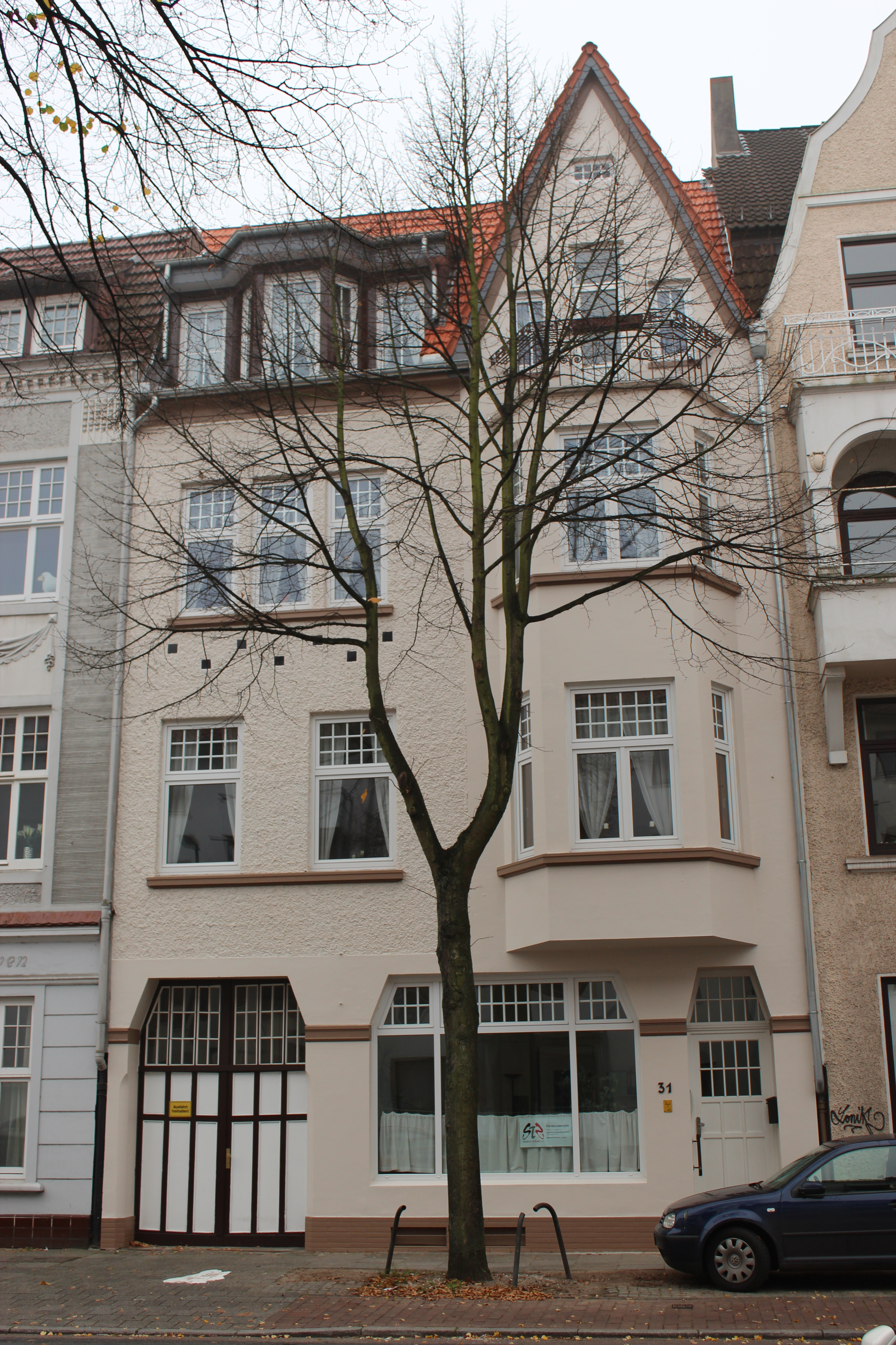 Mietshaus in Bremen, Lahnstraße 31. Das abgebildete Objekt ist ein geschütztes Kulturdenkmal in der Freien Hansestadt Bremen, mit der Nr. 0826 beim Landesamt für Denkmalpflege registriert.